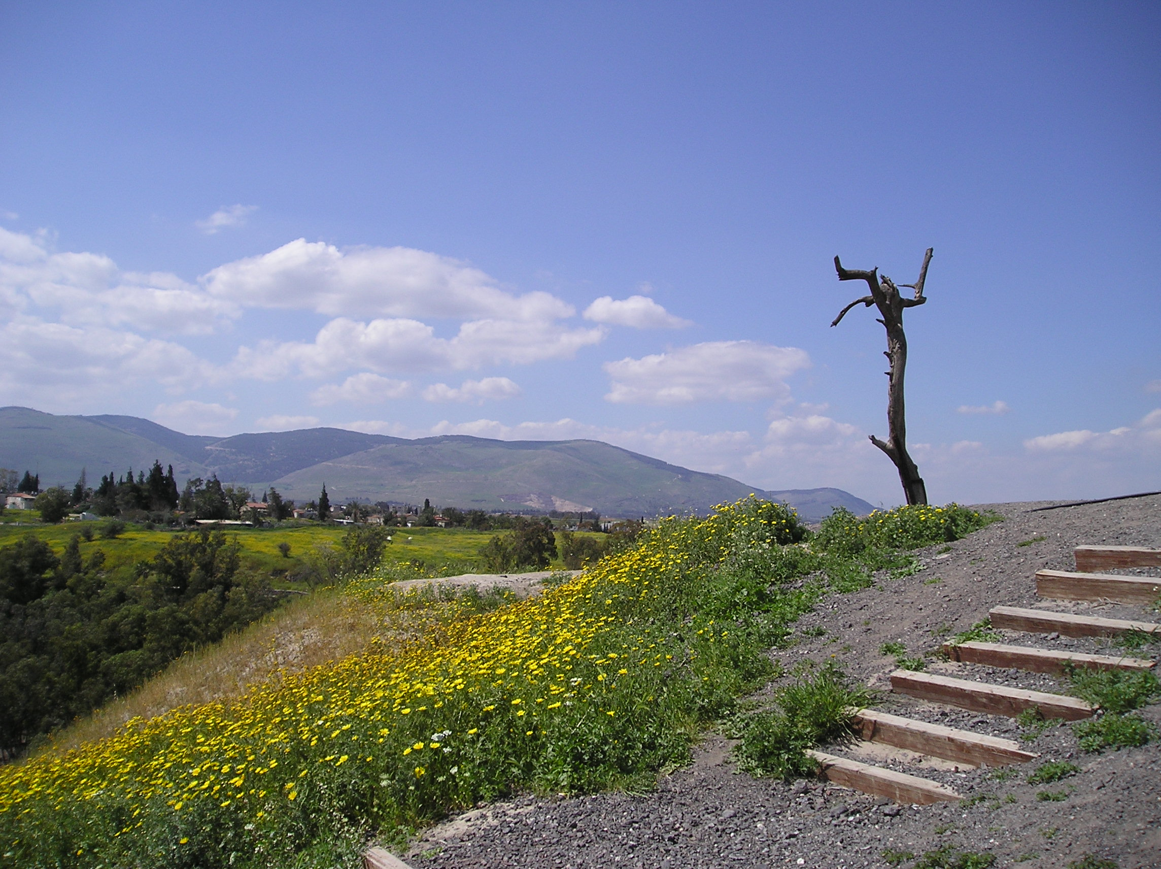 Bet Szean (stanowisko archeologiczne - Scytopolis) w Izraelu. Szczyt Tell El-Husn.